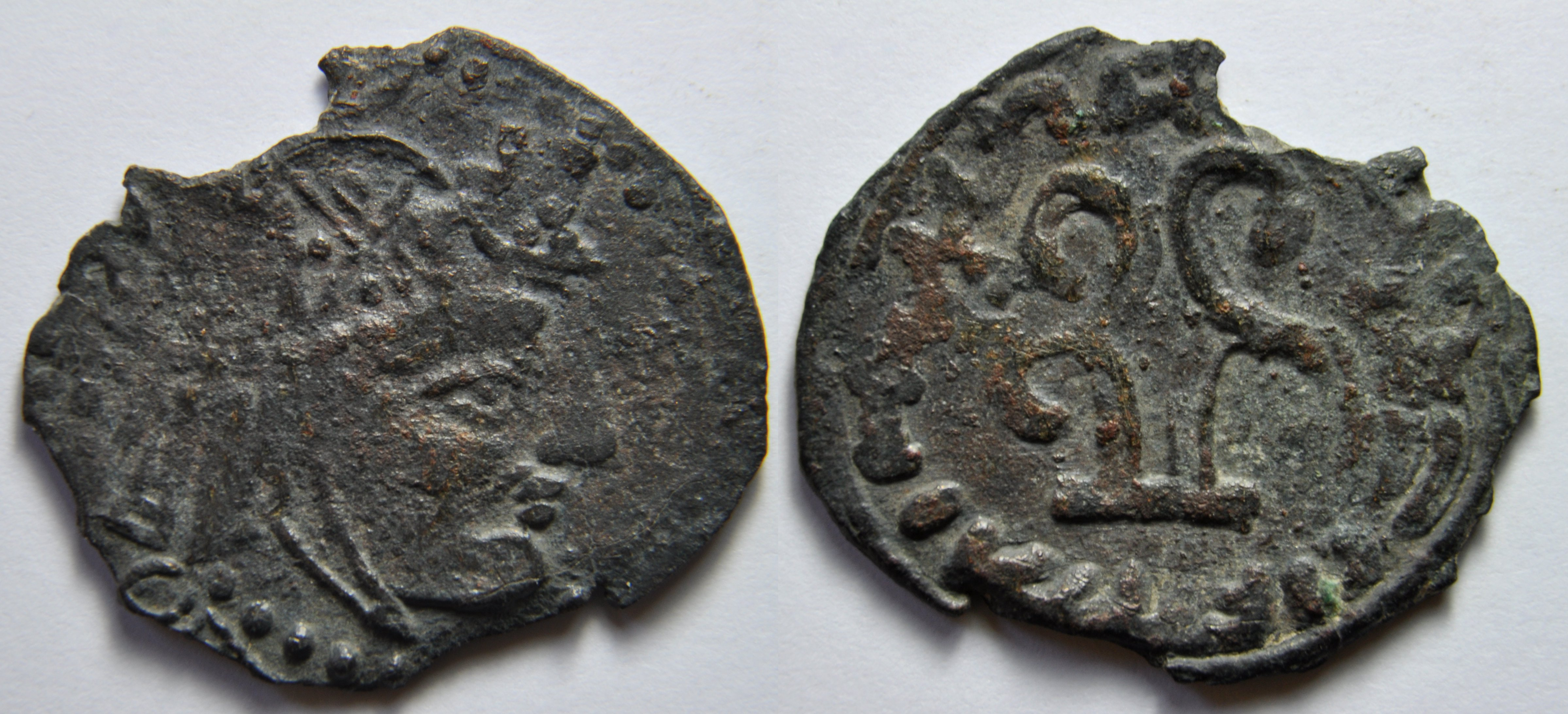 Une monnaie en bronze d'une unité inconnue du roi Azkatswar I vivant au début du VIIIe siècle (Il serait mort en 712 AD). A/ Buste imberbe du roi couronné à droite ; grénetis R/ Tamga au centre ; légende en langue locale MR'Y MLK wy/z k'nsw'r tout autour Dimension : 26 mm * 21 mm Poids : 2,52 g. Référence : #6 B.Vainberg, Coins of Ancient Khwarezm, type Г 11 ; voir aussi Zeno 80057 Remarques : La monnaie n'est pas cassée, elle a été faite sur un vieux flan déjà cassé. Ce type est originaire du district de Kerder, sans doute la production d'un atelier local. Indice de rareté : Très rare (Selon "Coins of Central Asia")